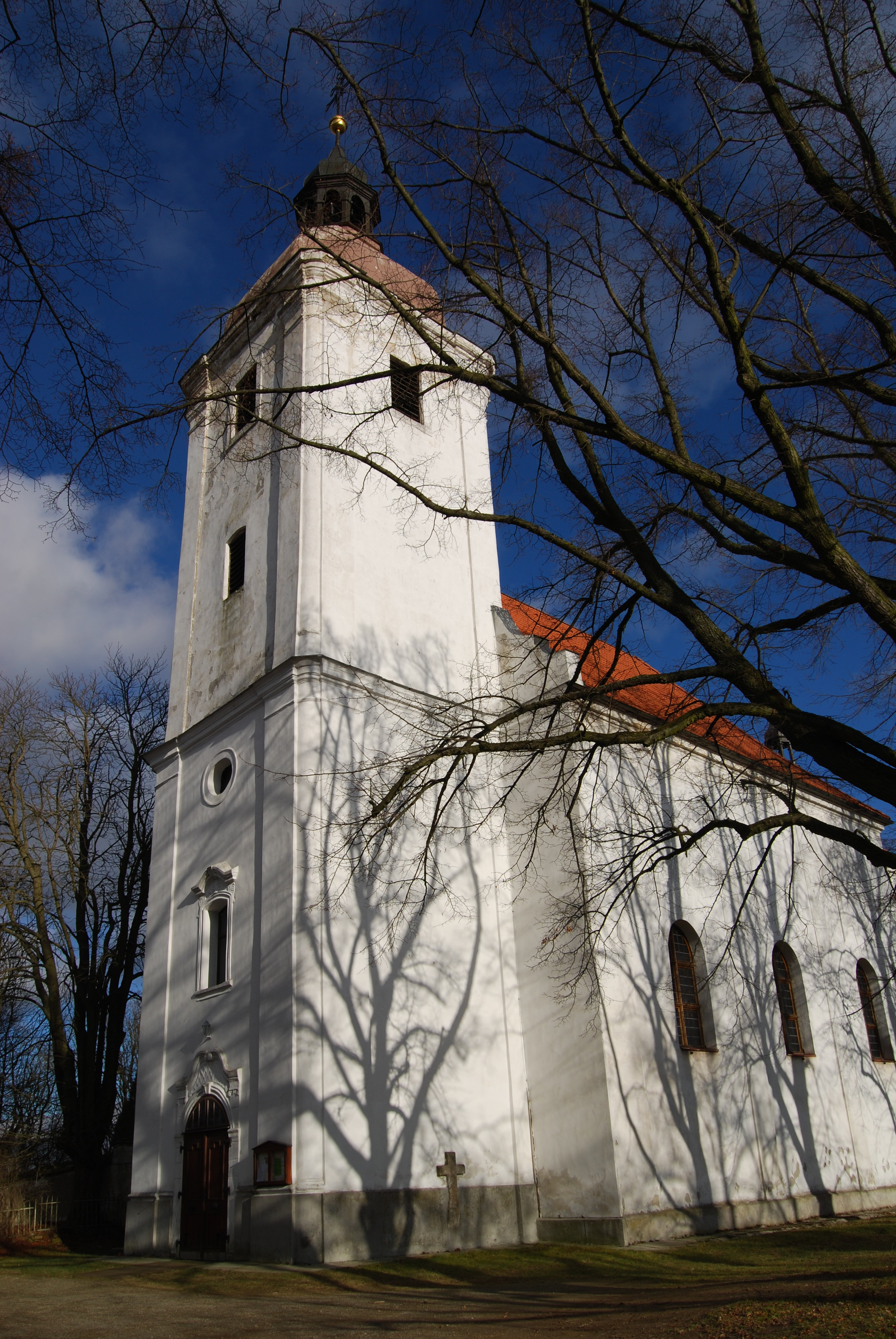 Kostel sv. Petra a Pavla. Chotoviny v okrese Tábor v Jihočeském kraji. Česká republika.